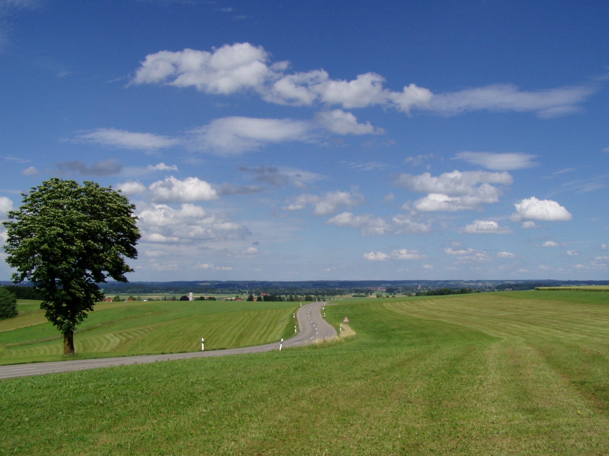 Bei Bedernau, Breitenbrunn